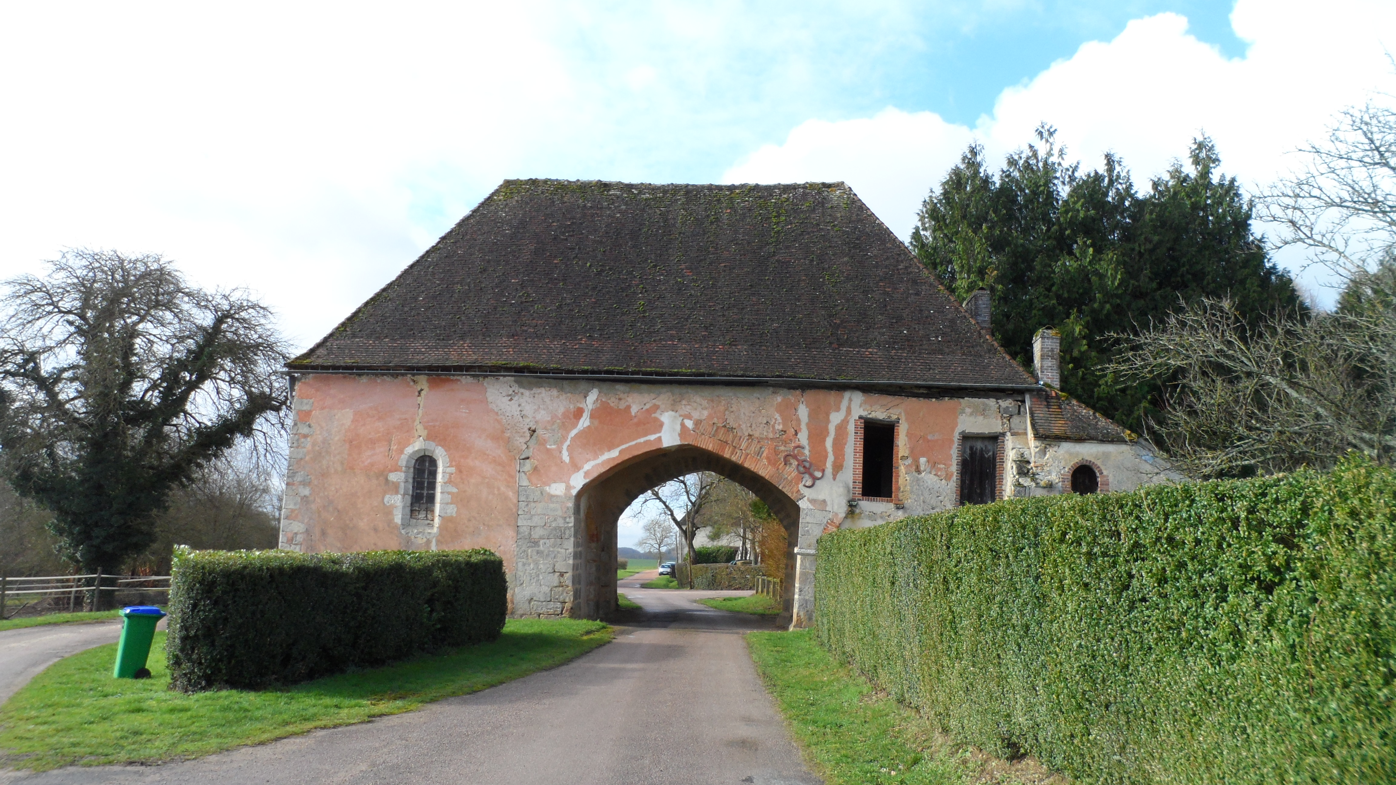 La porterie de l'abbaye des Echarlis de l'ordre de Citeaux fondée en1108 à Villefranche-Saint-Phal (Yonne)